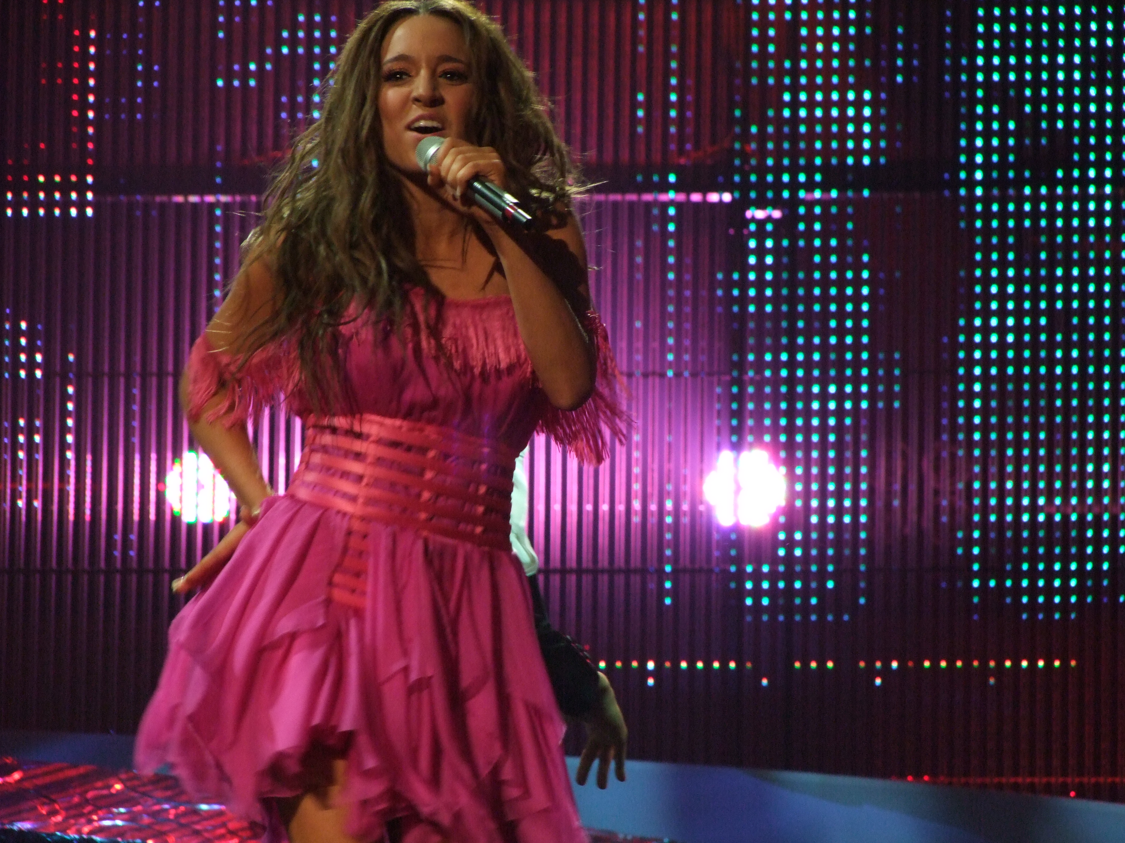 Semifinal 1 EUROVISION 2008